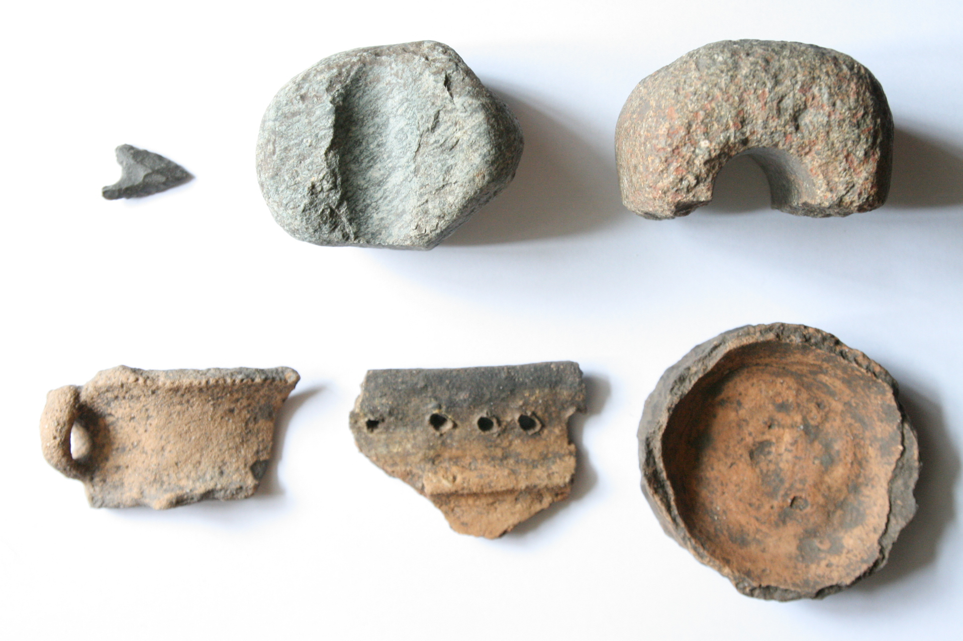 Sepsiszentgyörgyön talált neolitikus tárgyak maradványai (Erdély)